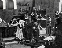 Fotogramma di Boccaccesca, regia di Alfredo De Antoni, produz I.C.S.A. Firenze - Roma, 1928